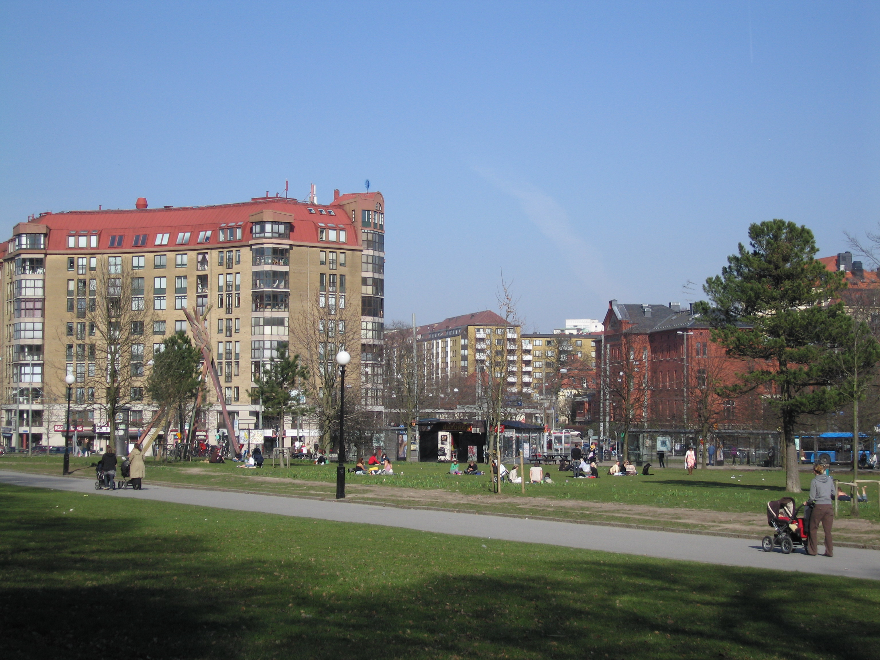 Linneplatsen in Gothenburg, viewed from Slottsskogen